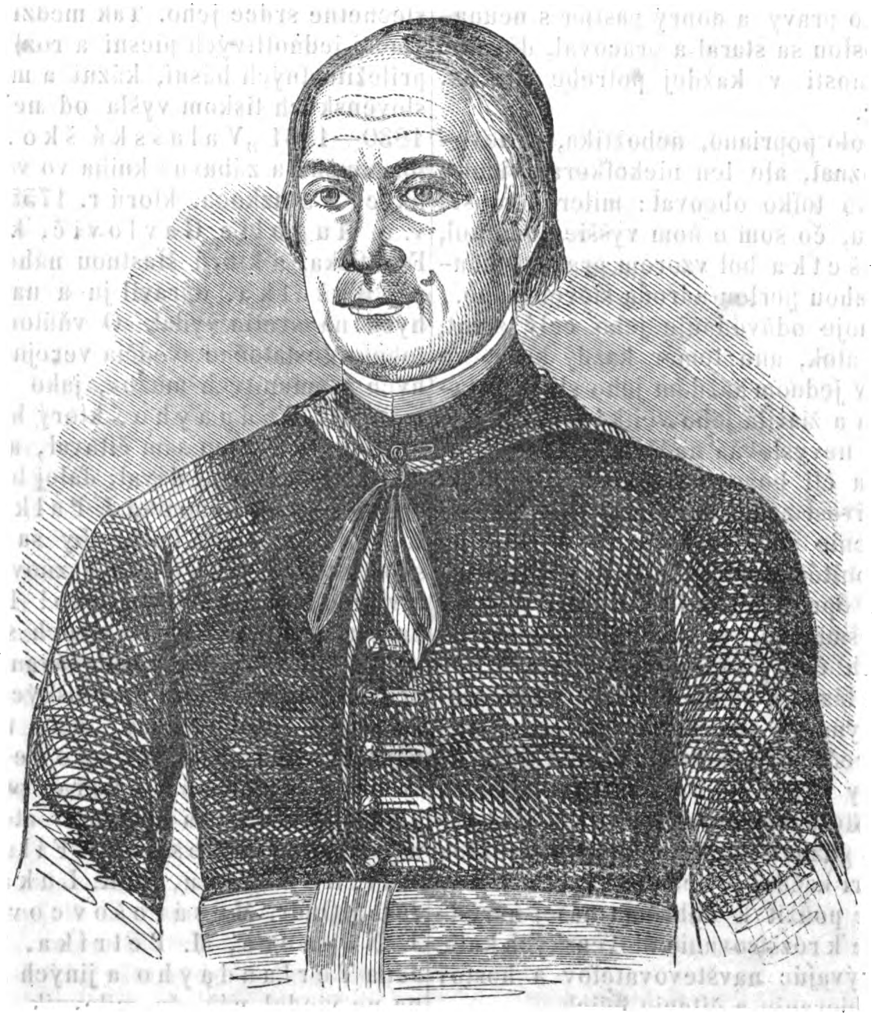 Michal Rešetka (1794 - 1854), slowakischer katholischer Theologe und Verleger